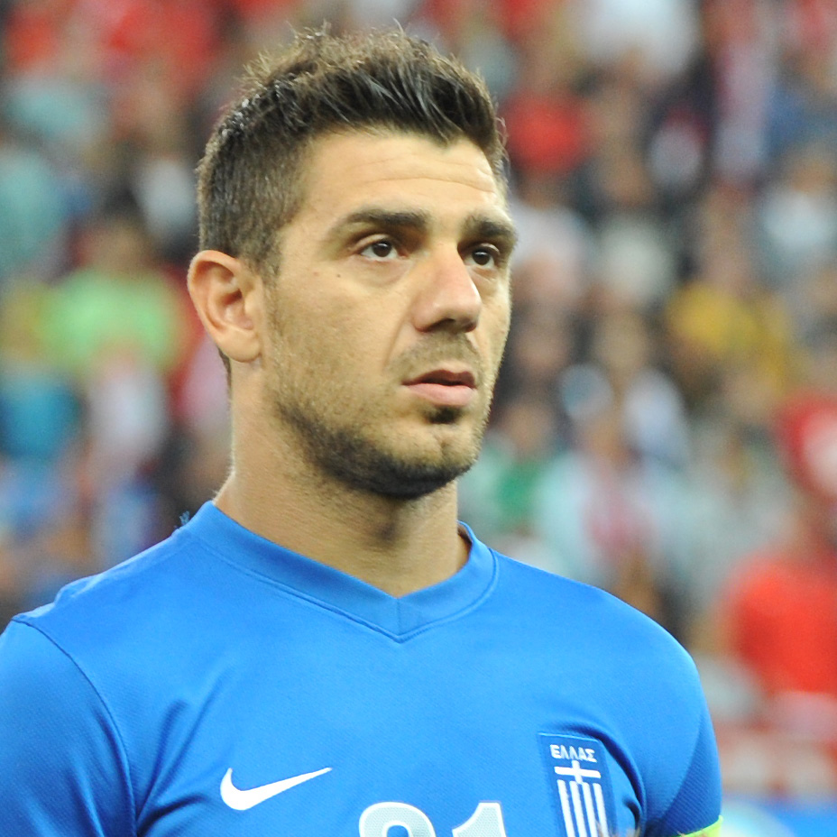 Freundschaftliches Länderspiel Österreich - Griechenland am 14. August 2013 in Salzburg: Kostas Katsouranis